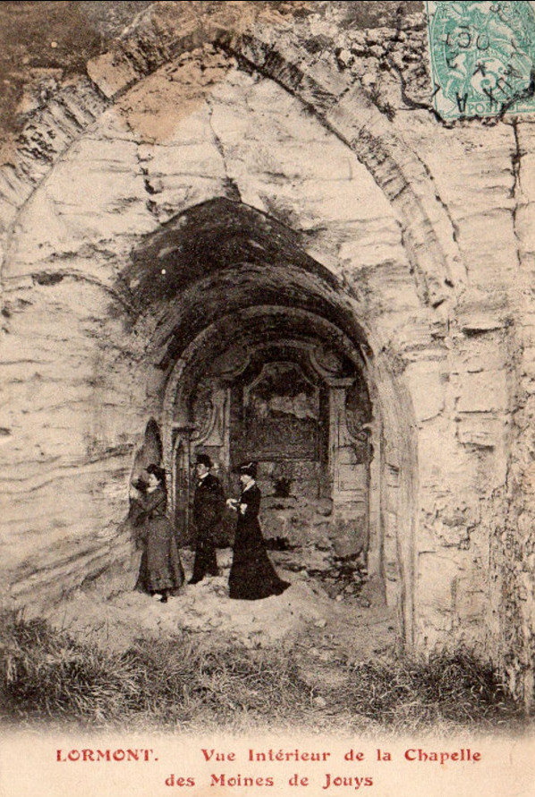 Ermiage de Ste Catherine, Lormont (1905)